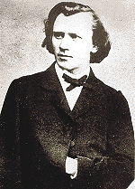 Johannes Brahms (1833-1897), jung